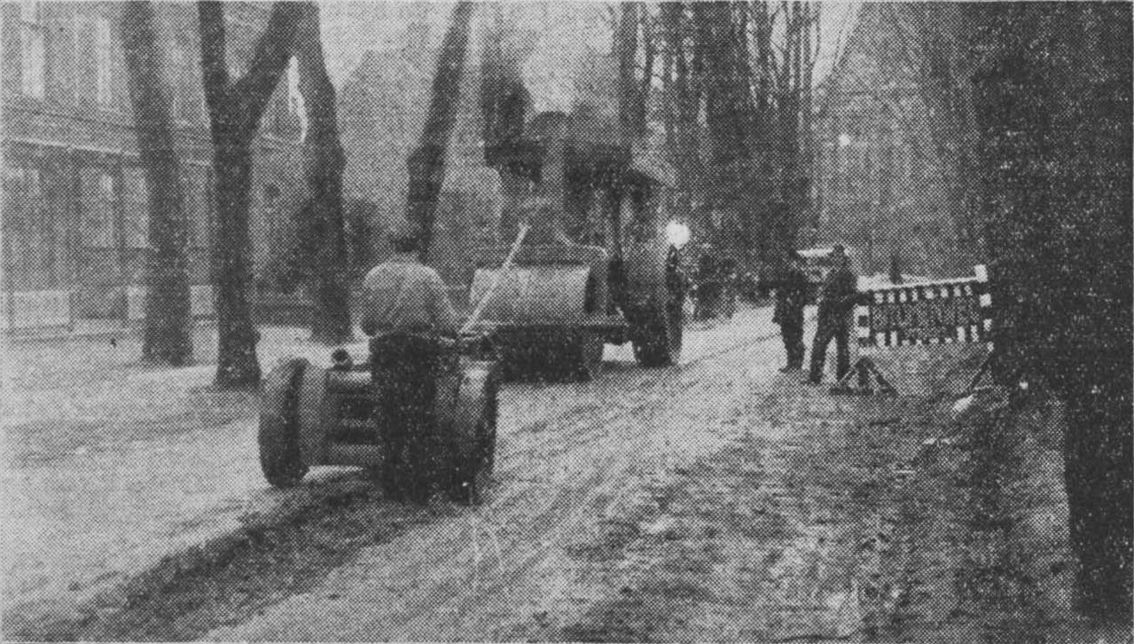 Kapellerlaan